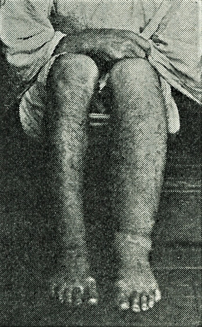 八丈小島のマレー糸状虫症による象皮病（昭和23年7月）